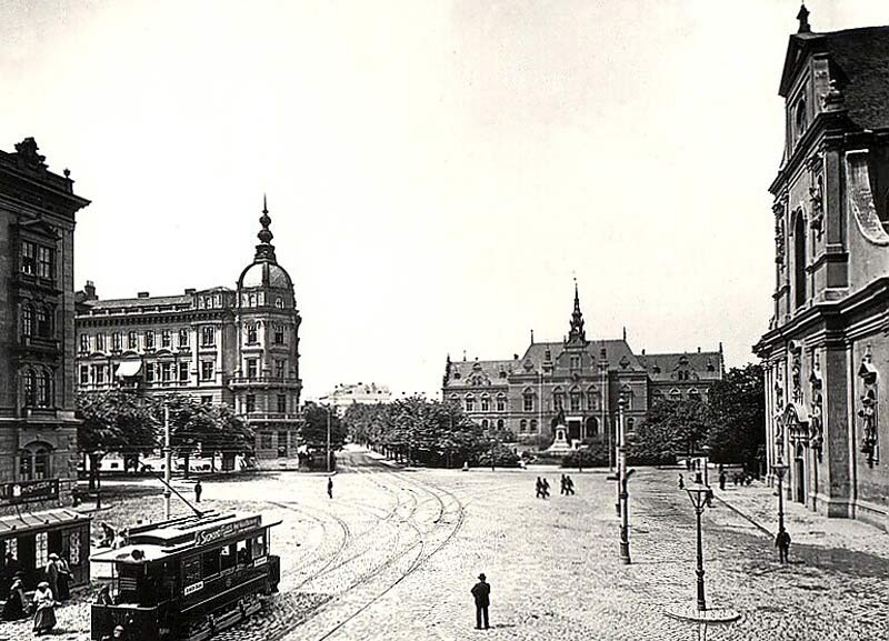 Archivní foto průčelí kostela Sv. Tomáše v Brně (1906) (pravá strana fotografie); napravo od středu fotografie je dnes již neexistující tzv. Německý dům na Moravském náměstí, který byl zbořen zanedlouho po konci 2. sv. války